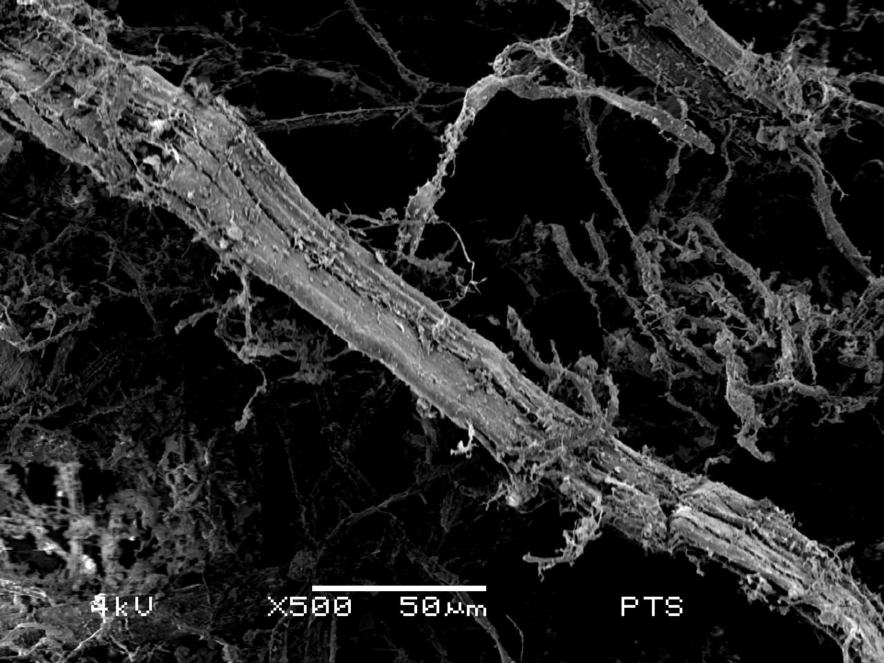 Fibrillierte Naturfaser SETRALIT